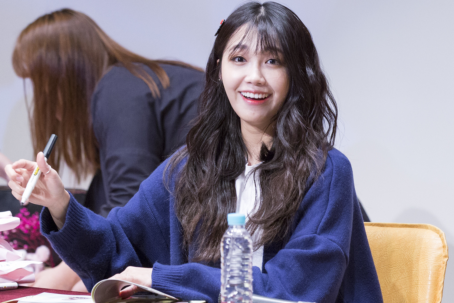 170423 목동 청소년수련관 정은지 공간 팬싸인회 part1